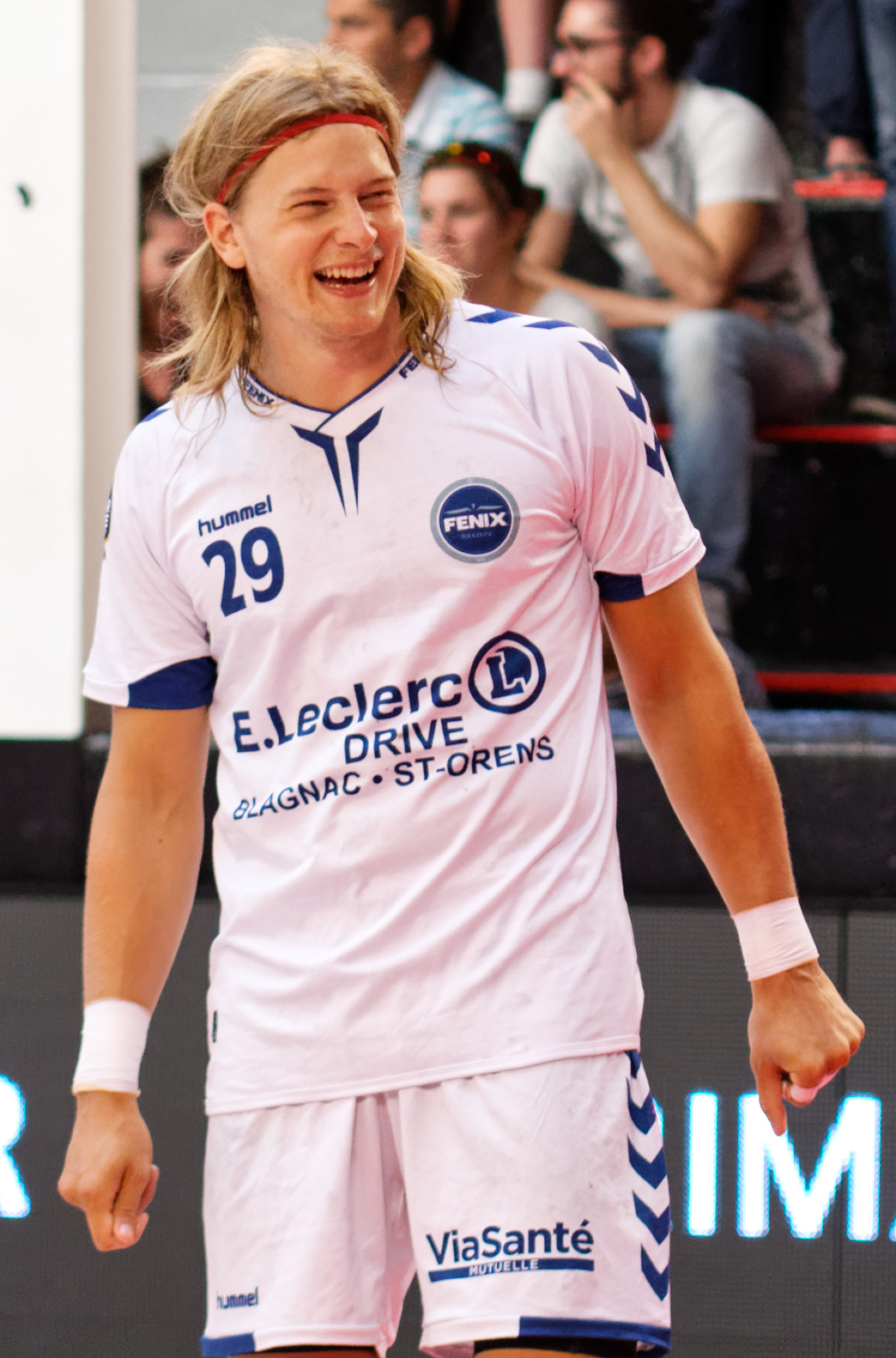 Rencontre de championnat de LidlStarLigue entre l'US Ivry et Toulouse. A Ivry, le 31 mai 2017.